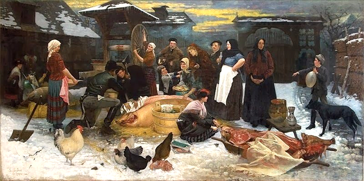 Gyárfás Jenő (Sepsiszentgyörgy, 1857. április 6. – Sepsiszentgyörgy, 1925. december 3.) magyar író, festő és grafikus. A tél öröme